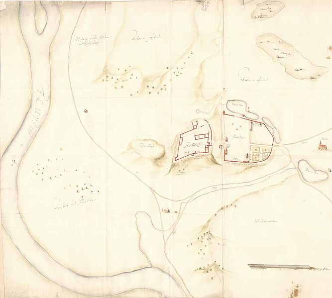 Sigulda linnuse ja ümbruskonna plaan XVII sajandist. Läänekaar asub allpool.